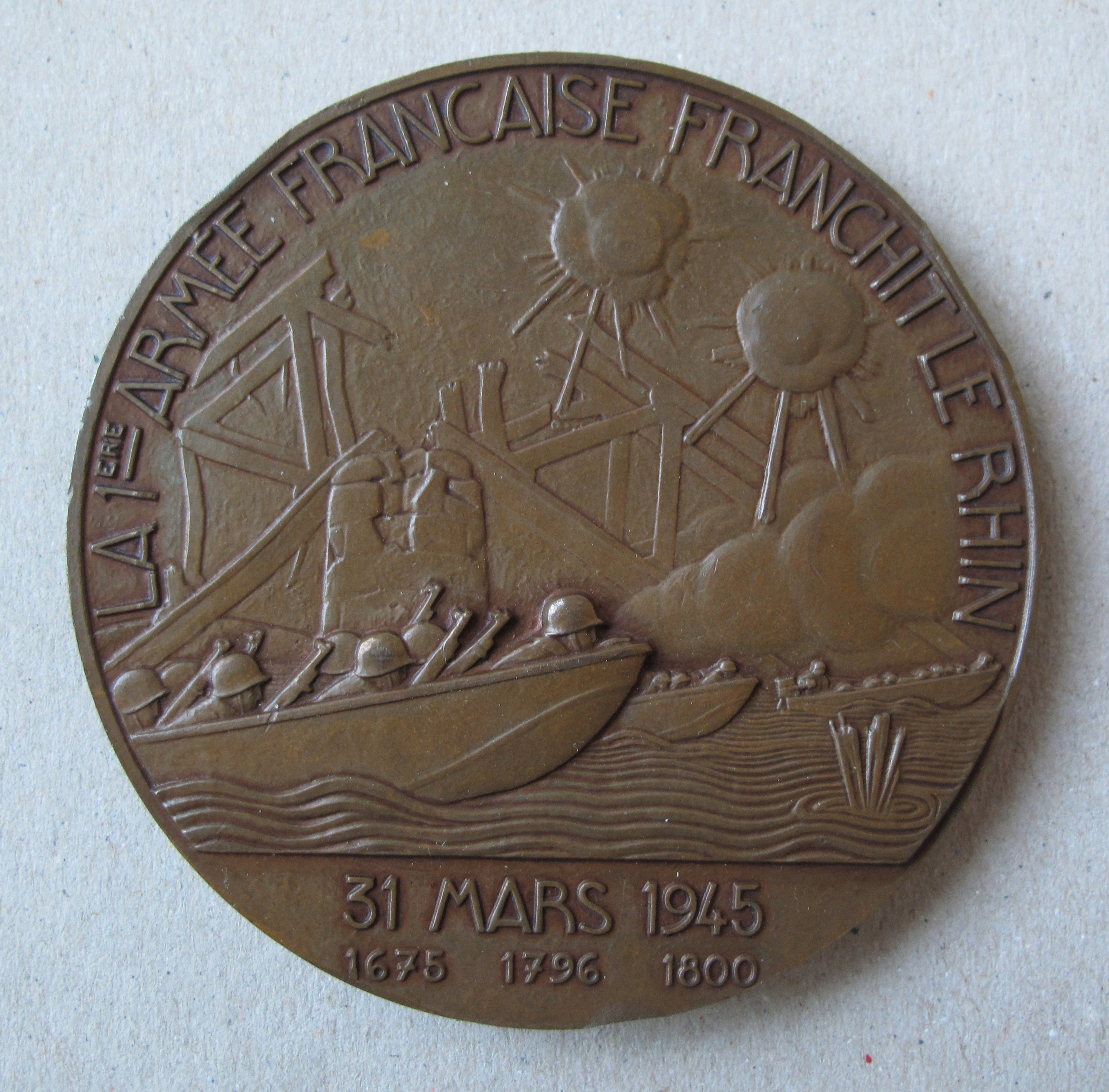 Gedenkmedaille (Rückseite) zur Rheinüberquerung des französischen Generals de Lattre de Tassigny 1945